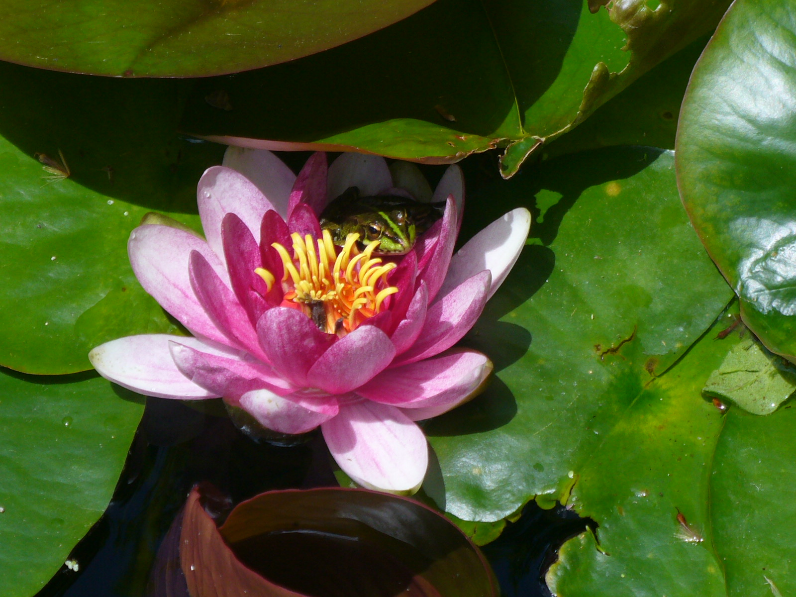 Rano (Pelophylax perezi) sur nimfeo. Palaco Quiñones de León, Vigo, Galegio